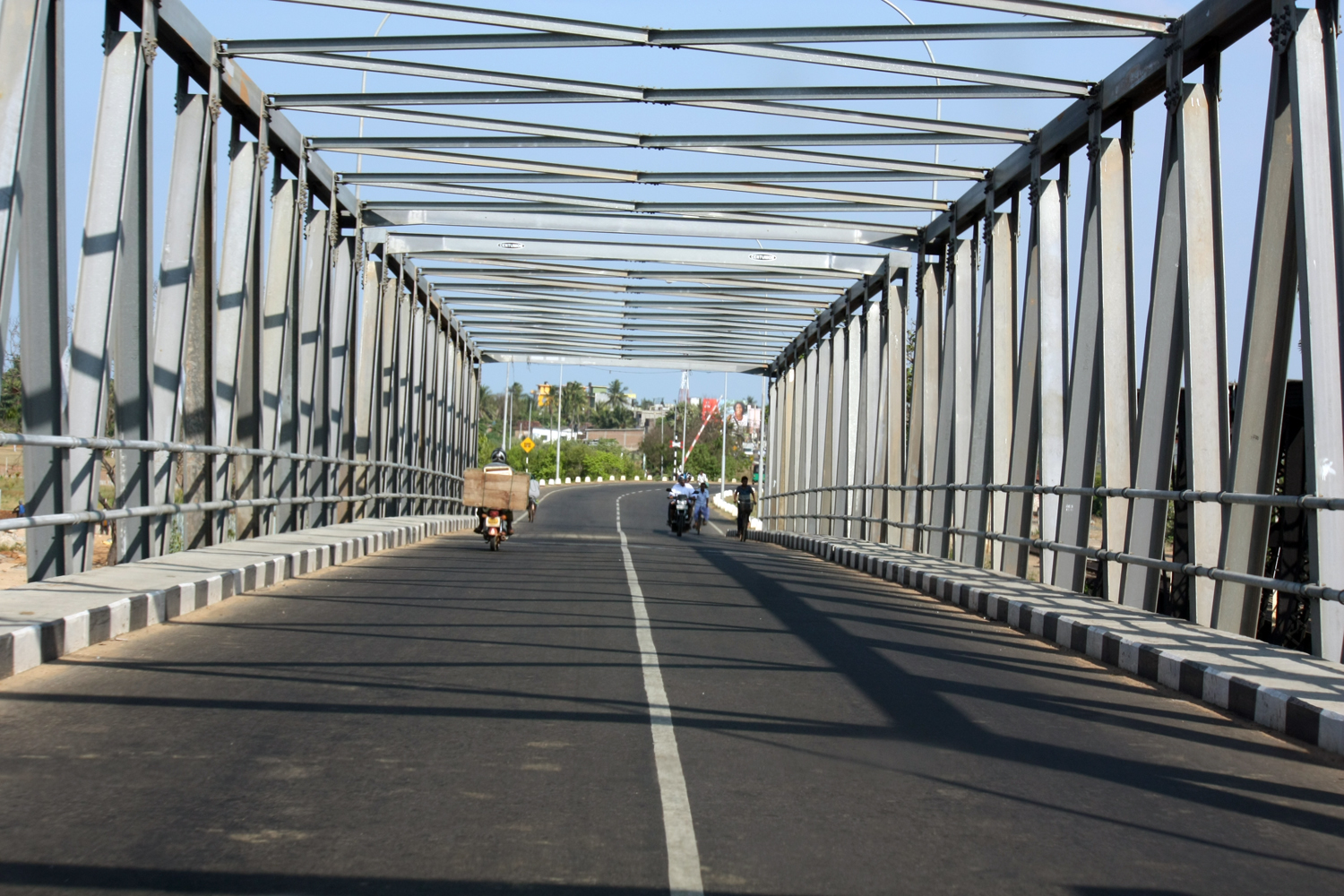 மட்டகளப்பு மாவட்டம்